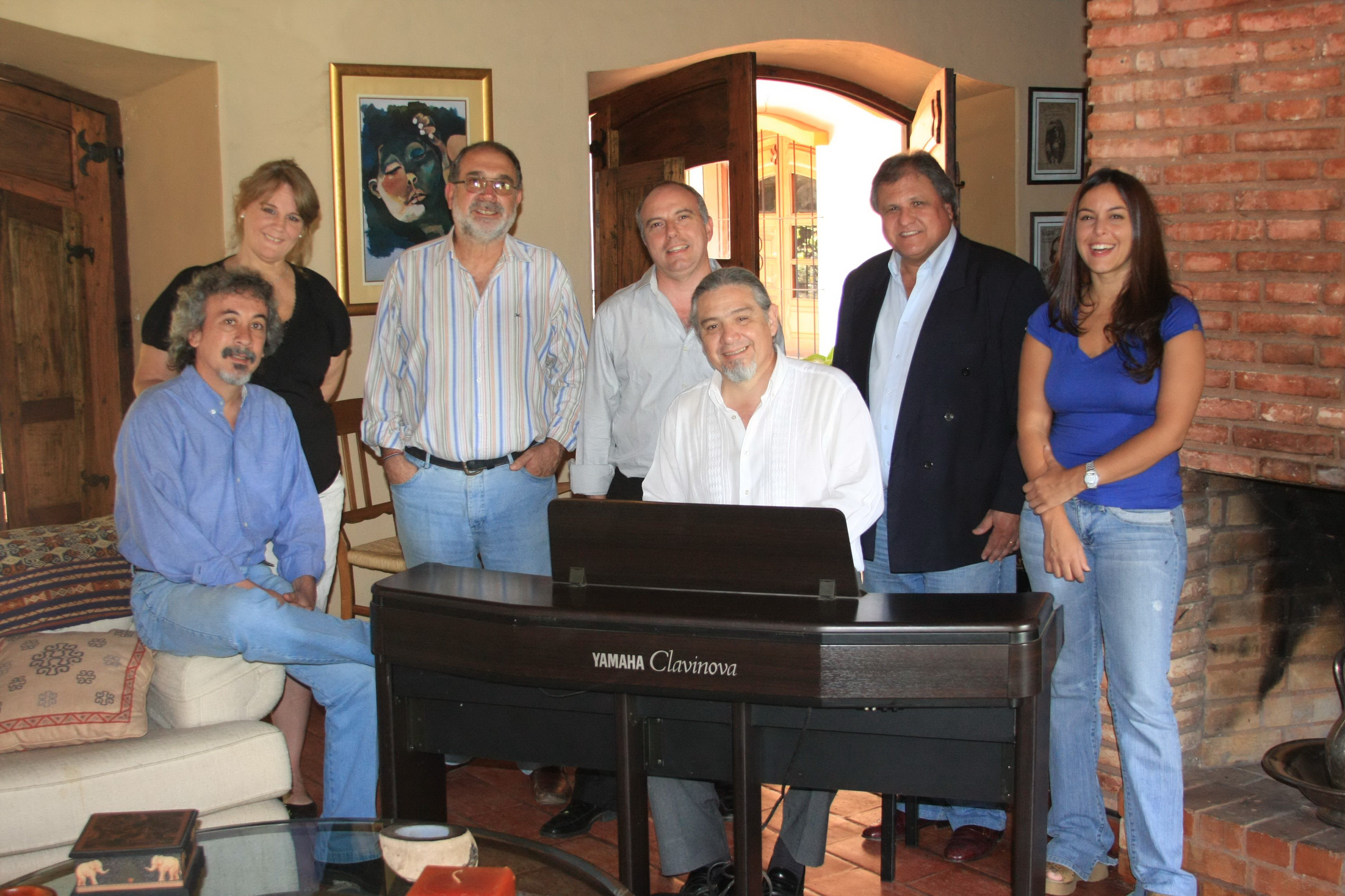 Foto de los sembradores en la galeria